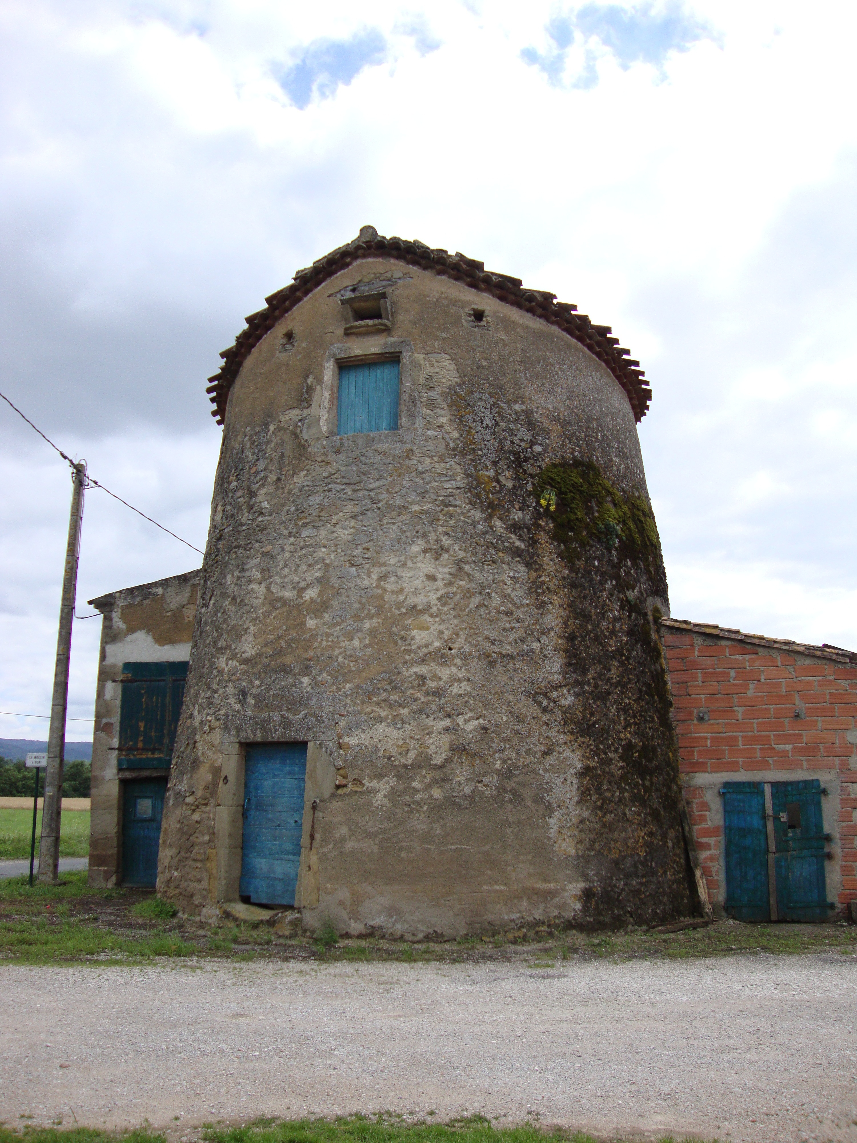 Viviers-lès-Montagnes (Tarn, Fr) vieux moulin à vent.